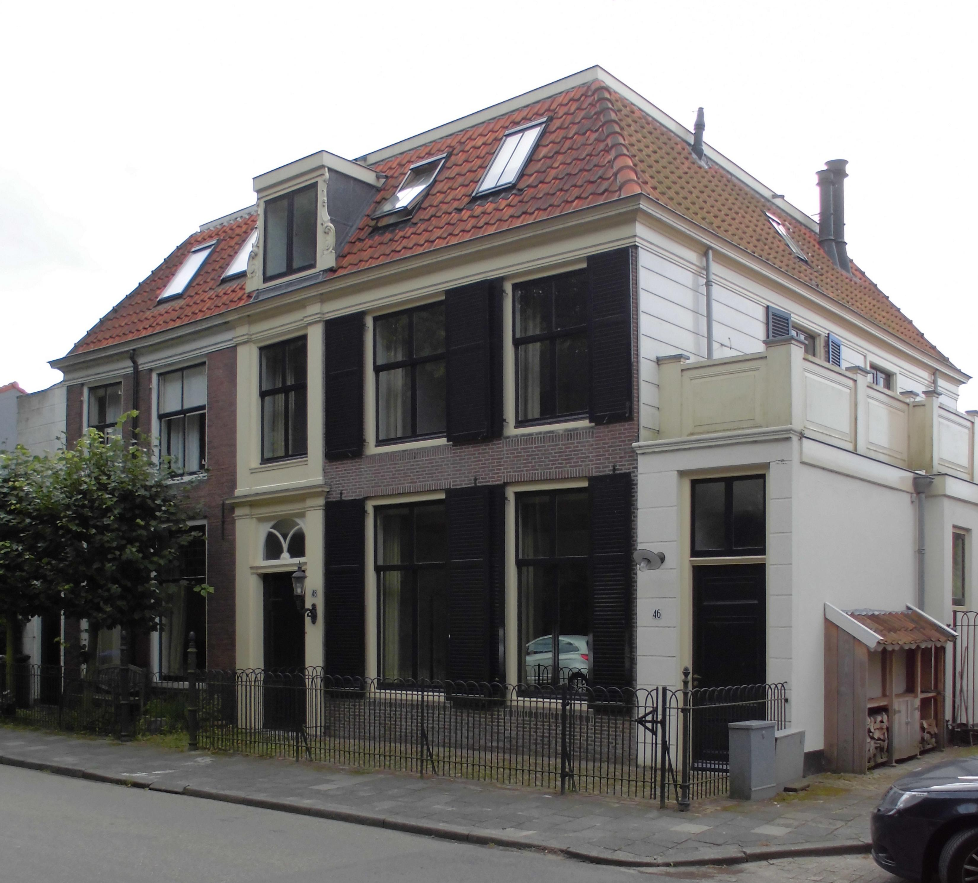 Schoonoord Zuidereinde 46 's-Graveland